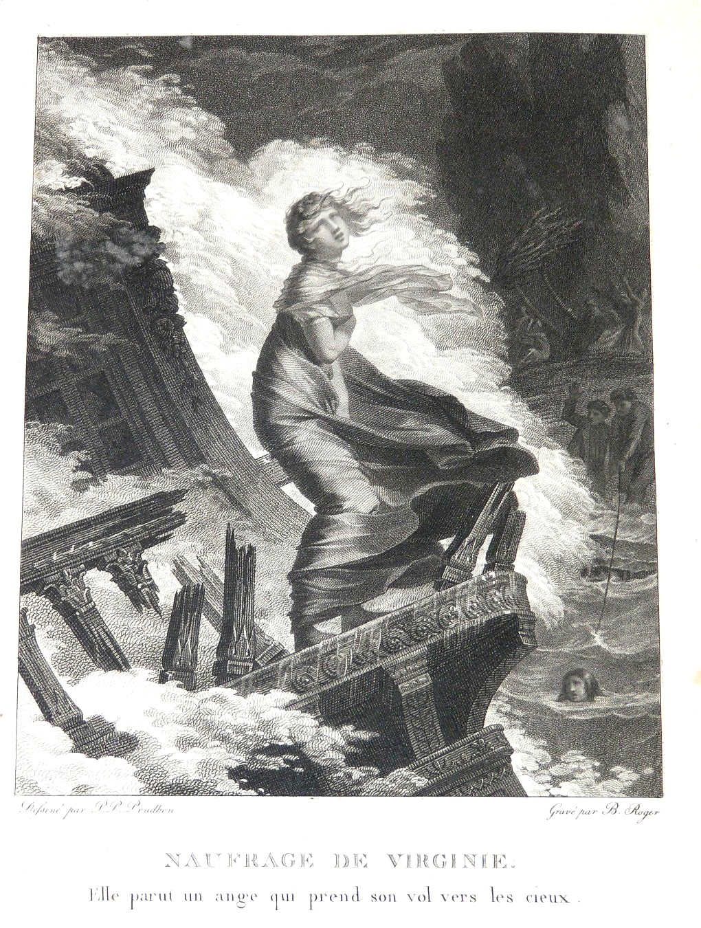 Gravure de Paul et Virginie, édition Didot de 1806, dessin de Prud'hon.